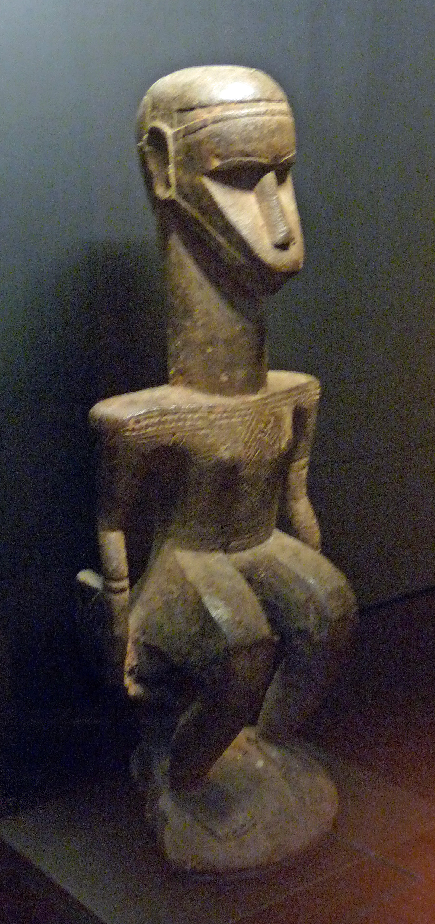 Statue d'autel, population Bidjogo, Guinée-Bissau. Musée du quai Branly.